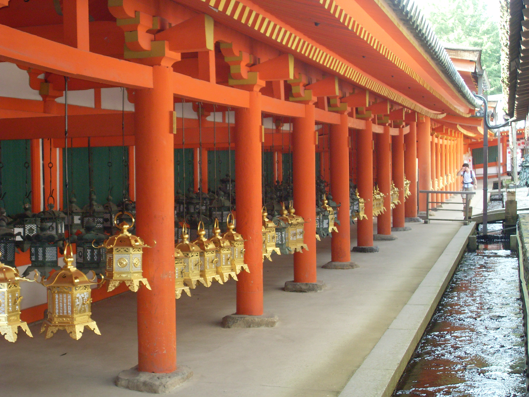 Votive lanterns at Kasuga-taisha, Nara, Japan